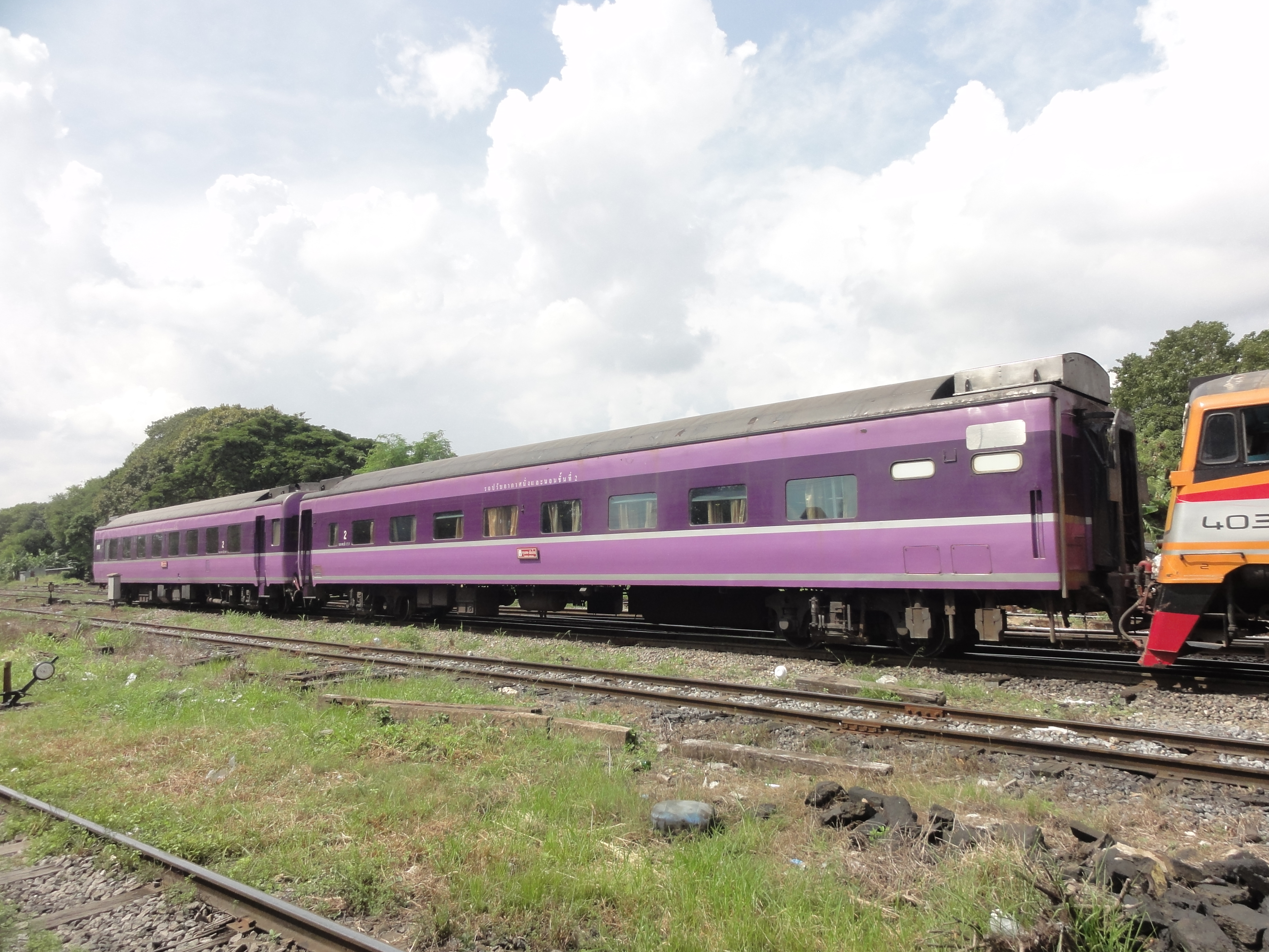 タイ国鉄に譲渡された国鉄24系客車